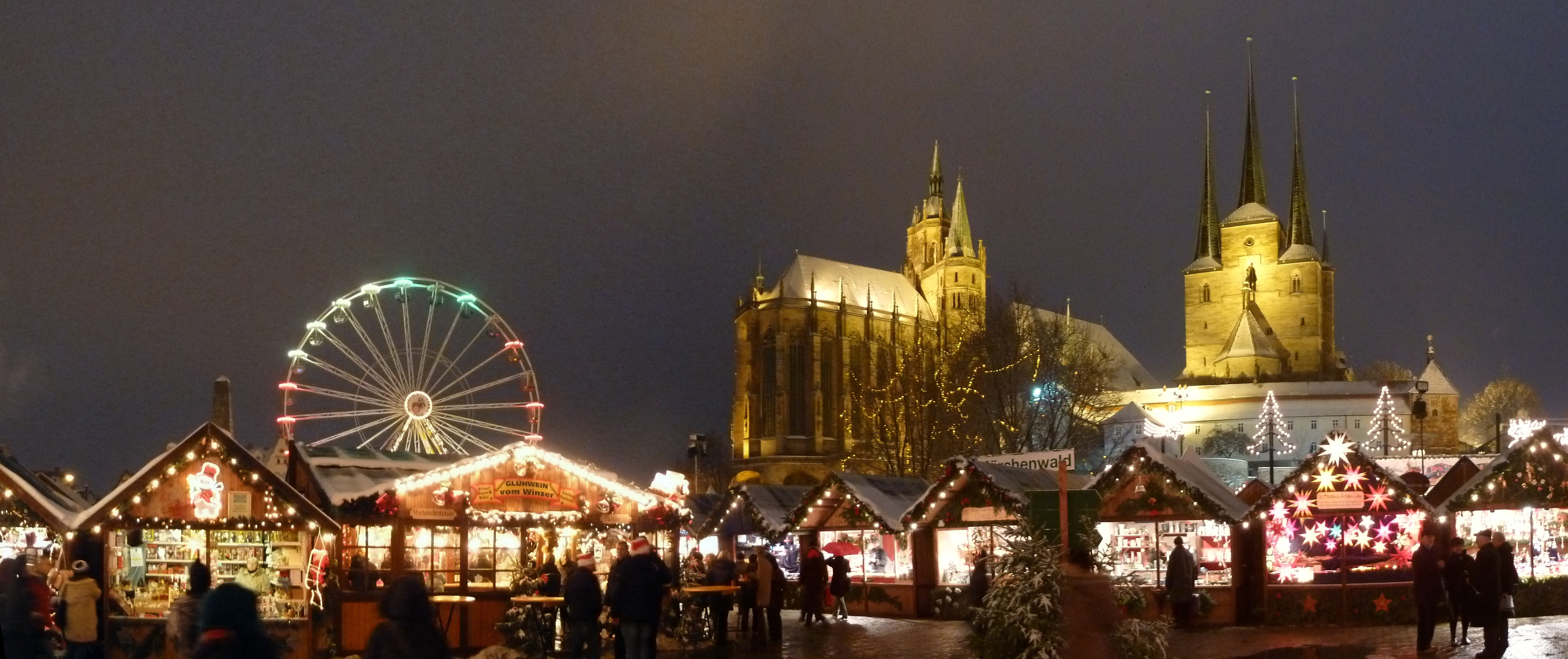 Erfurter Dom, Ansicht Weihnachtsmarkt